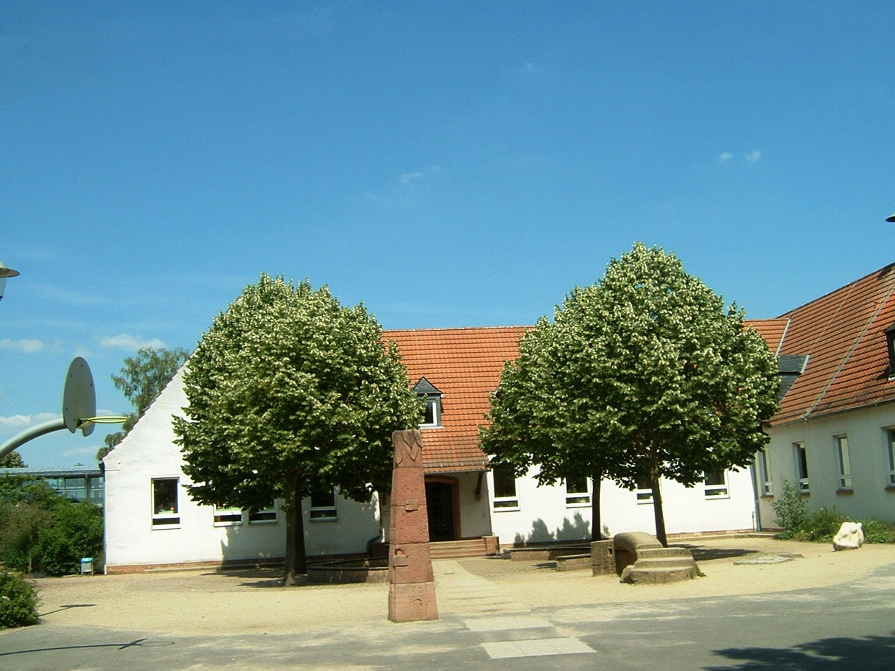 alte Schule in Nilkheim